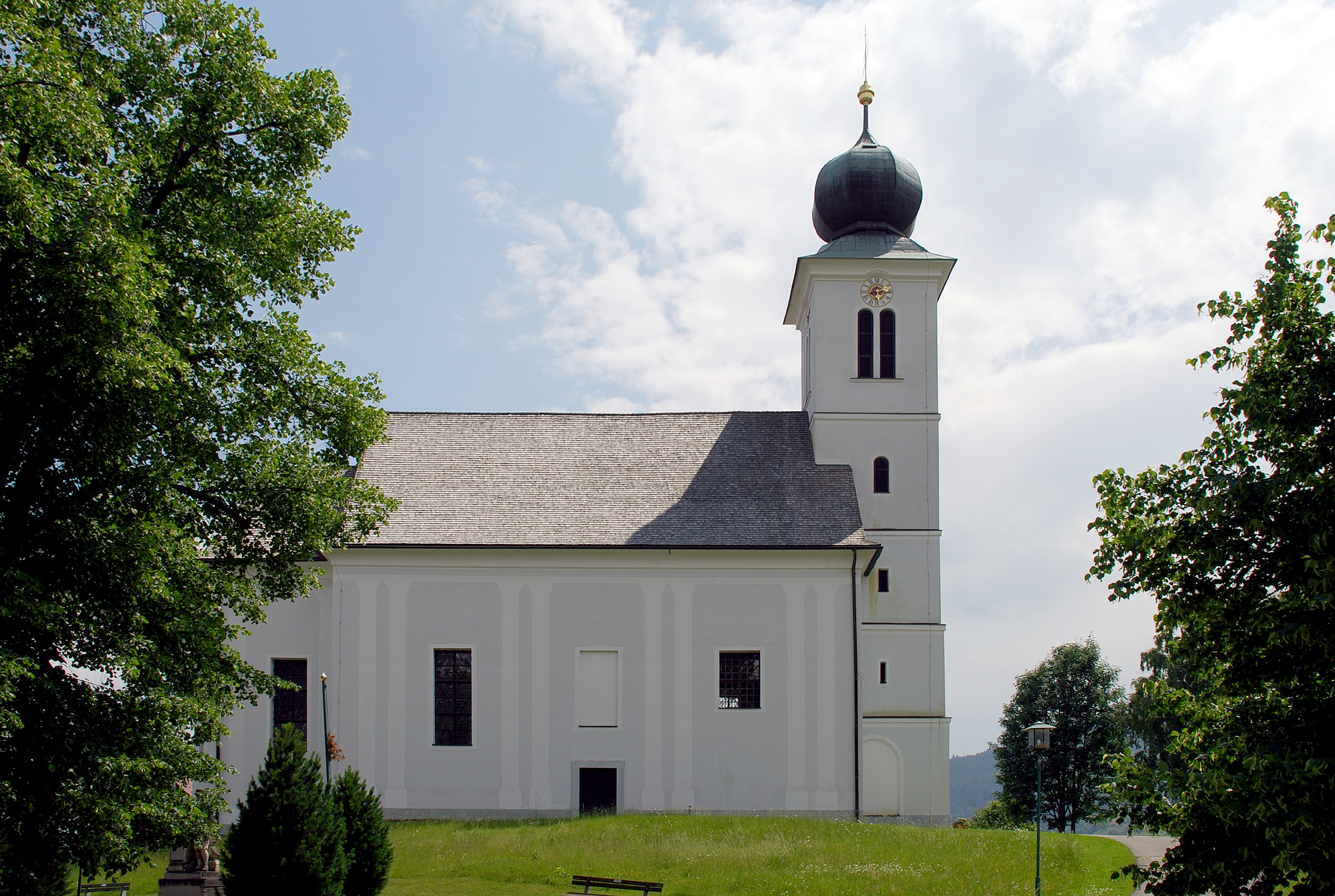 St. Oswald ob Eibiswald, Steiermark, Österreich: Pfarrkirche